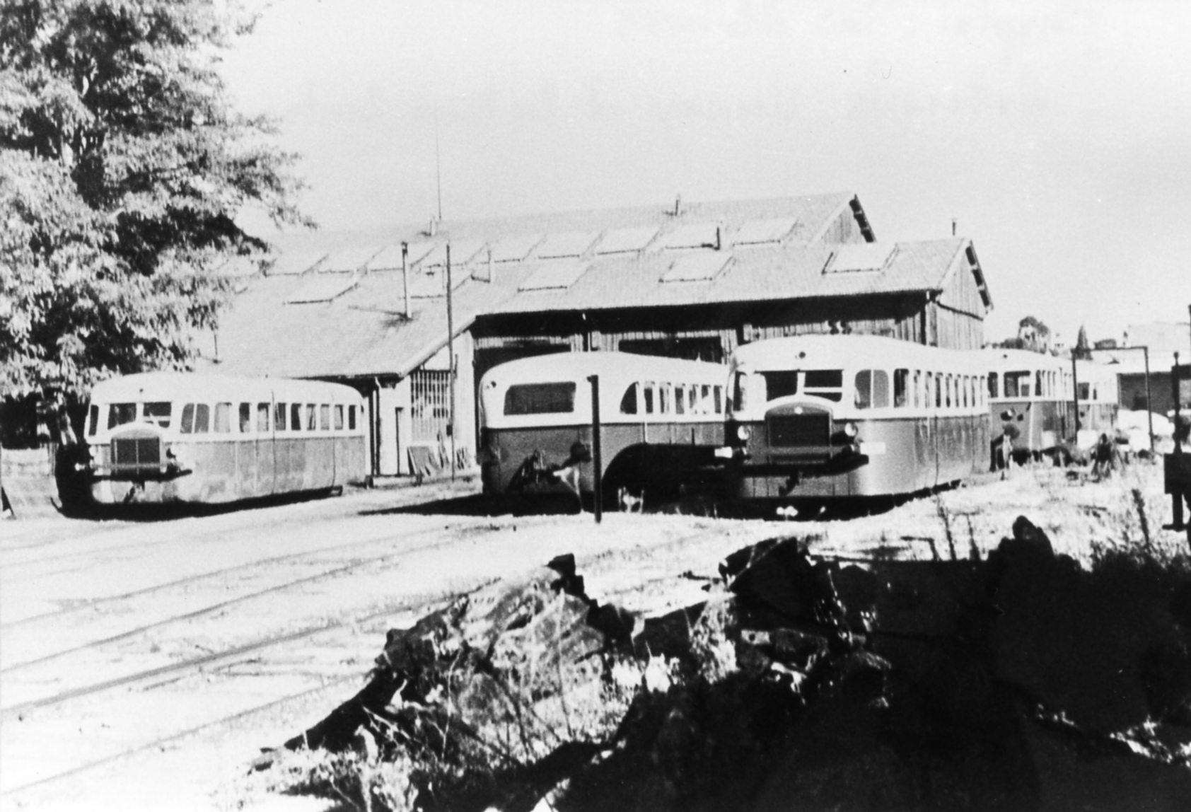 Chemins de fer de l'Hérault - Trois autorails Verney série ZZ-CC au dépôt de Montpellier-Chaptal, prés des ateliers dans les années 1950. A droite à l'arrière, l'autorail De Dion-Bouton Z-101 et sa remorque-pilote ZR-101.